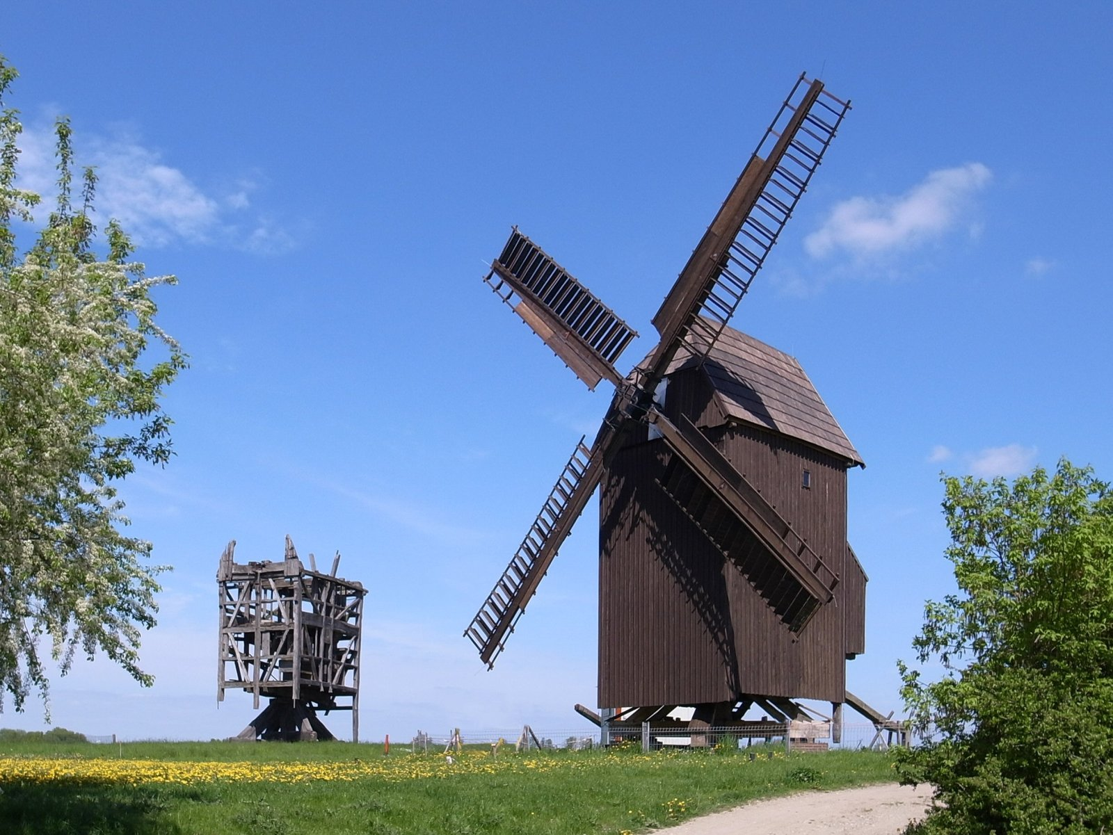 Zwochau, neue Bockwindmühle, (Tafel an der Windmühle, unveränderter Text: Mühlenregion Nordsachsen, Zwochauer Bockwindmühle, Eigentümer: Gemeinde Zwochau, Standort: Am Sportplatz 5 04509 Zwochau. 1806 in Schkeuditz erbaut, 1956 zum letzten Mal geschrotet, 1995 Umfangreiche Rekonstruktion durch die letzten Mühlenbesitzer Elly und Max Perl, 2007 Demontage in Schkeuditz aufgrund der Flughafenerweiterung und Umsetzung einschl. Rekonstruktion der Mühle auf dieses Grundstück, welches bereits seit 1844 Bockwindmühlenstandort ist, 2009 Einweihung der windgängigen und mahlfähigen Mühle zum 16. Deutschen Mühlentag, Besonderheit Schrägstockgetriebe. (weitere Informationen: zwochauer-muehlenverein muehlen-nordsachsen), Koordinaten: N51 27.538 E12 16.424)